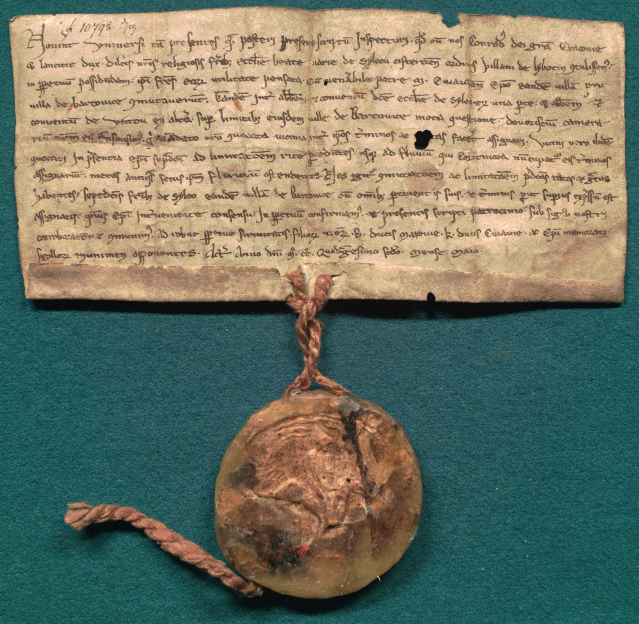 Konrad, ks. krakowski i łęczycki, stwierdza, że komornik wyznaczył granice sporne między klasztorem cystersów w Sulejowie i norbertanów w Witowie dla wsi Barkowice. Język: łac. Opis zewnętrzny: oryg., 1 k. pergaminowa, 20,3 x 9,5 + 1,2 cm; pieczęć na sznurze. Data: maj 1242